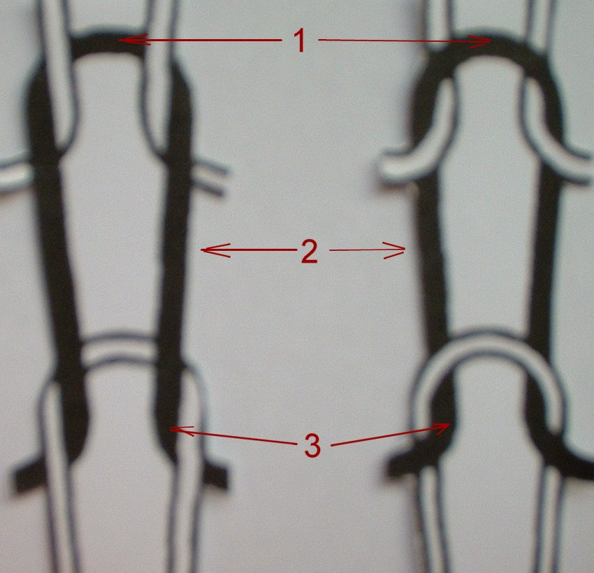 Rechte und linke Masche